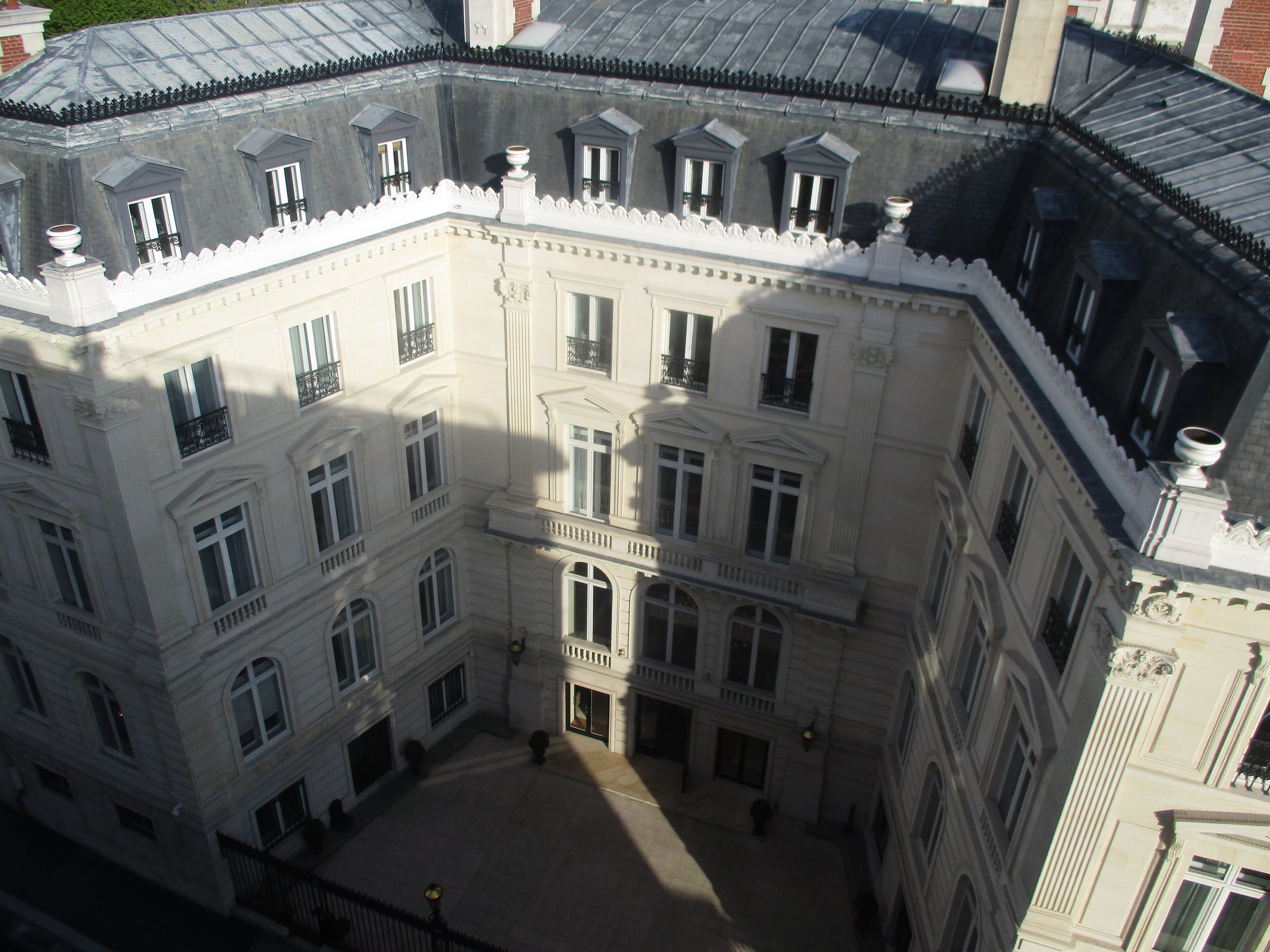 11 rue de Tilsitt, Paris XVIIe. Siège de Capgemini